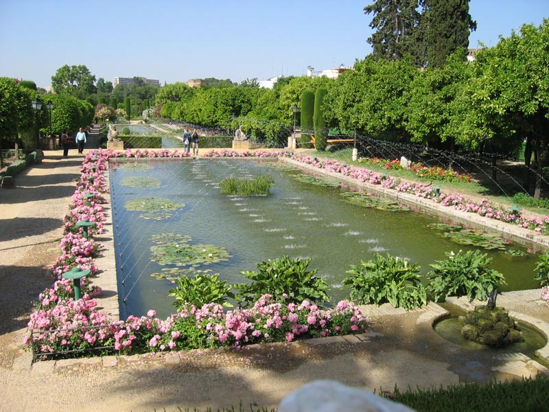 Garden with fountains and pond, at Alcázar de los Reyes Cristianos, en Córdoba (España).